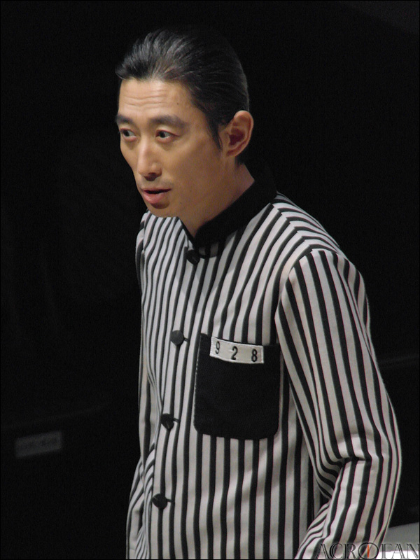 연극 허탕 프레스콜